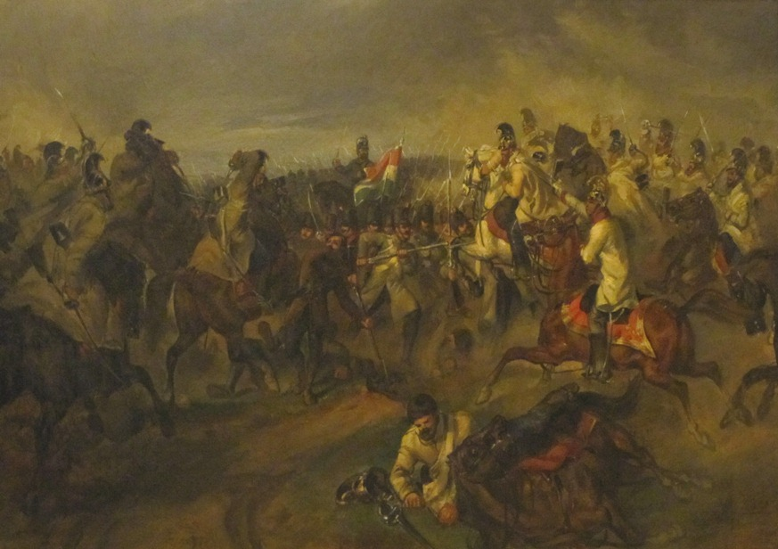 Angriff des Dragonerregimentes Nr.3 gegen ungarische Aufständische in der Schlacht bei Raab am 28. Juni 1849 (Revolution 1848).